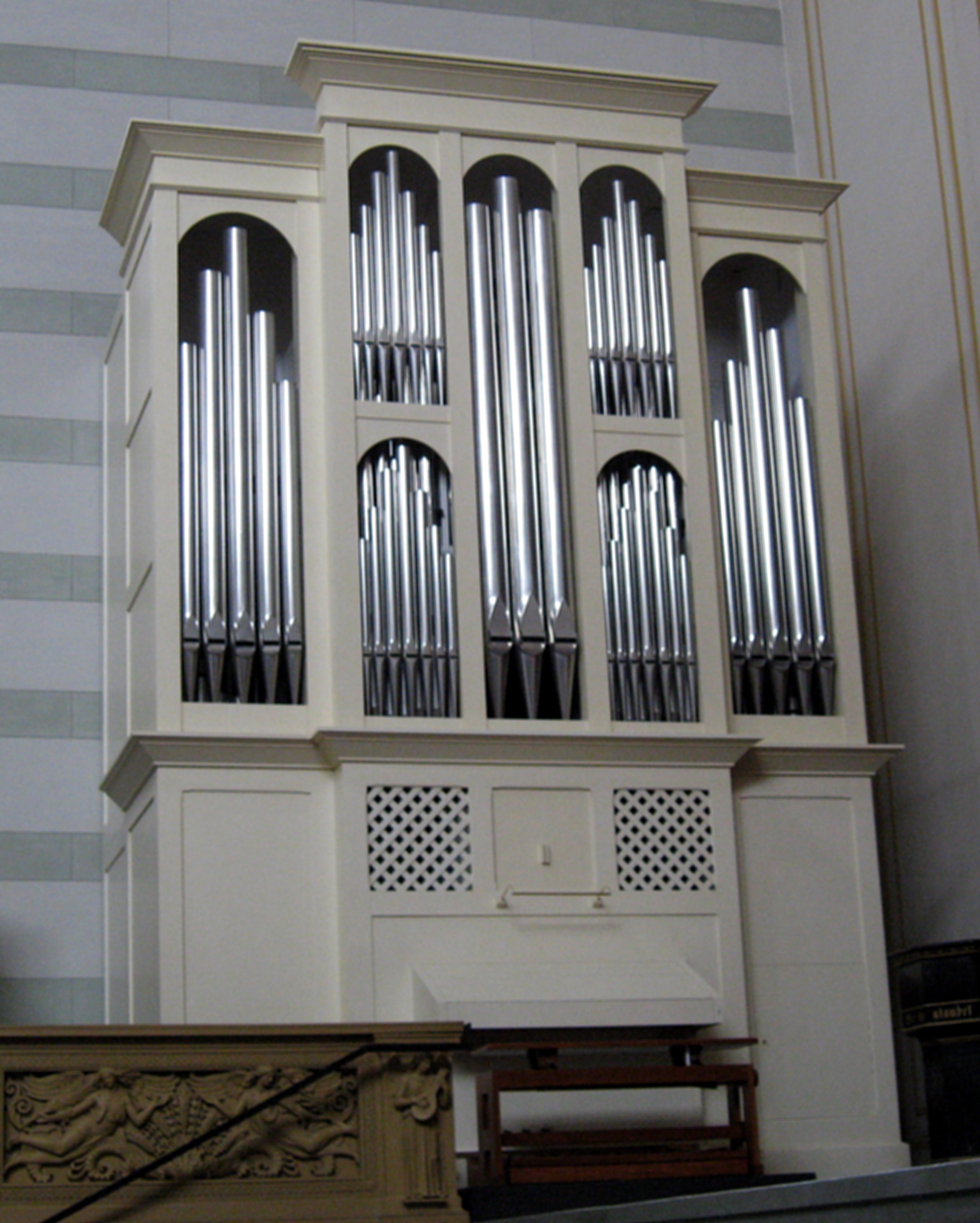 Potsdam - St. Nikolaikirche - Chor-Orgel (Kreienbrink 2005)